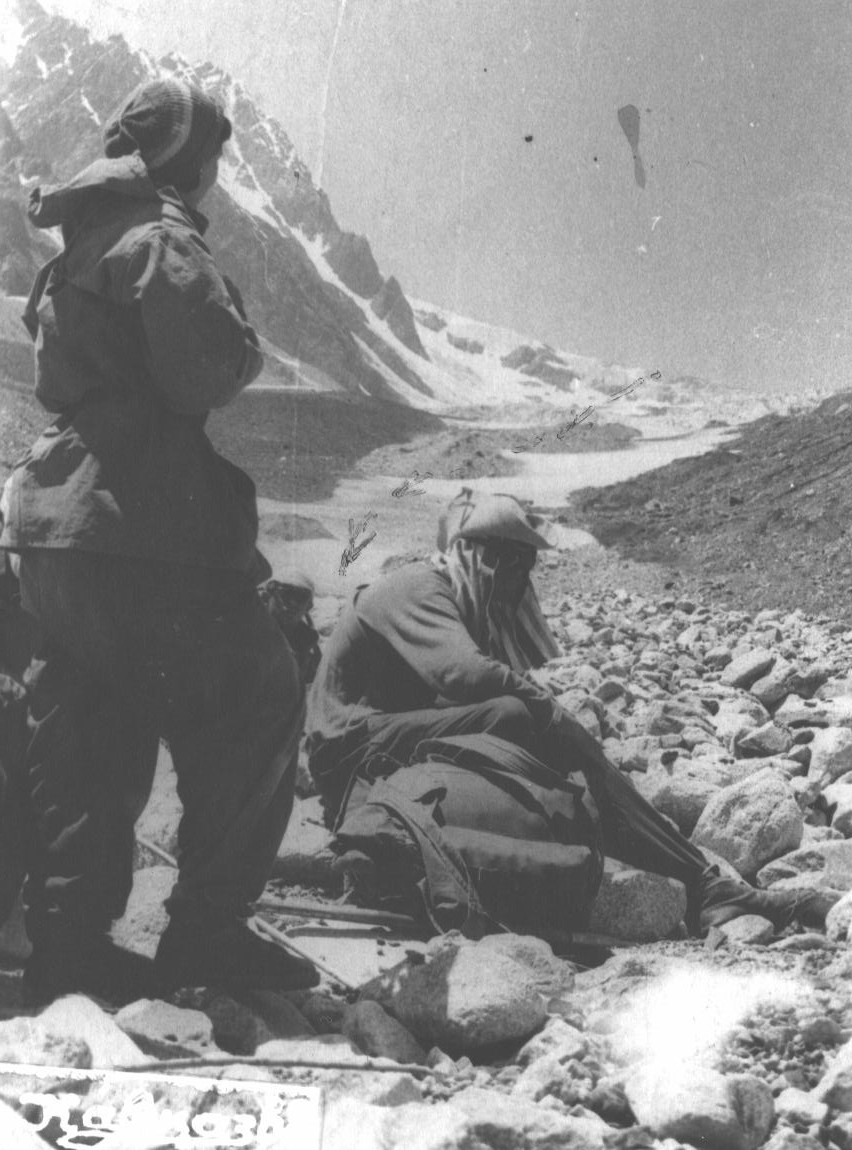 Фото